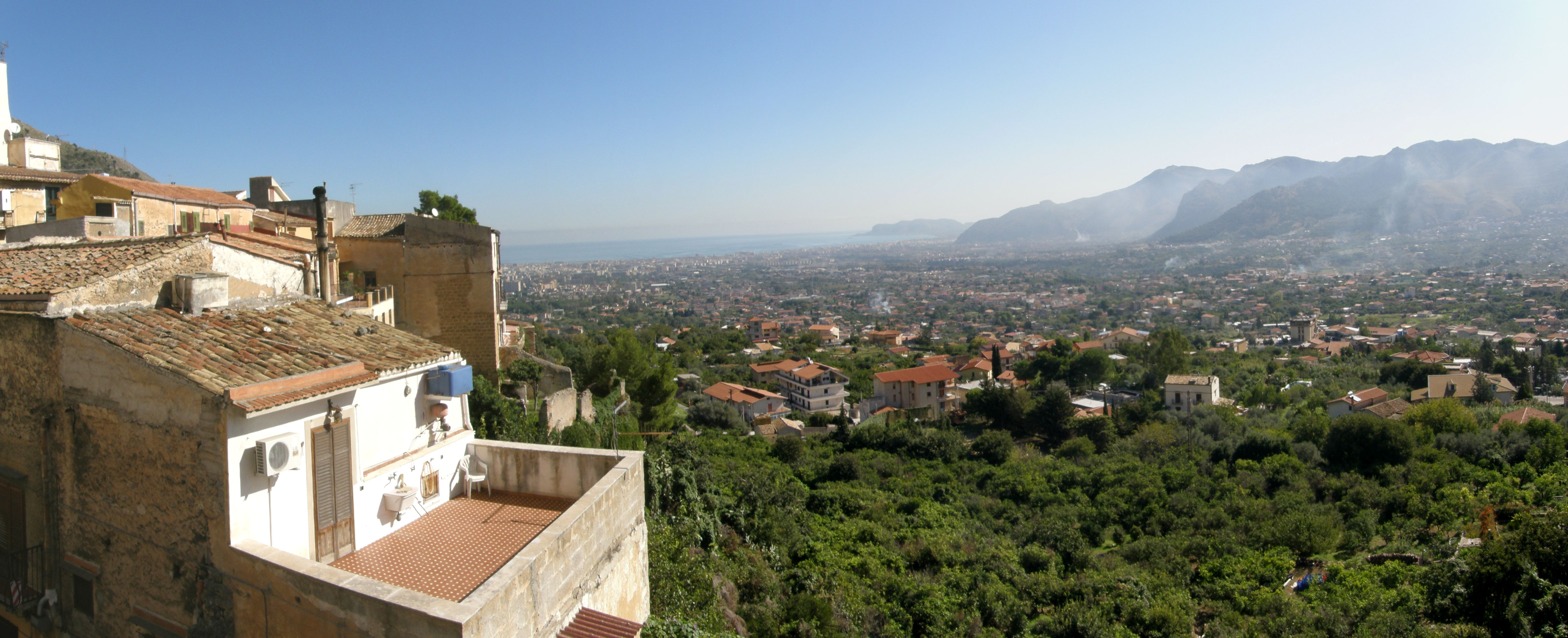 Monreale